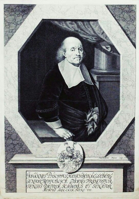 Johann Philipp Fleischbein (seit 1665 Fleischbein von Kleeberg) der Ältere (1601–1671), Kaufmann und Ratsherr der Reichsstadt Frankfurt am Main, Schöff und Bürgermeister